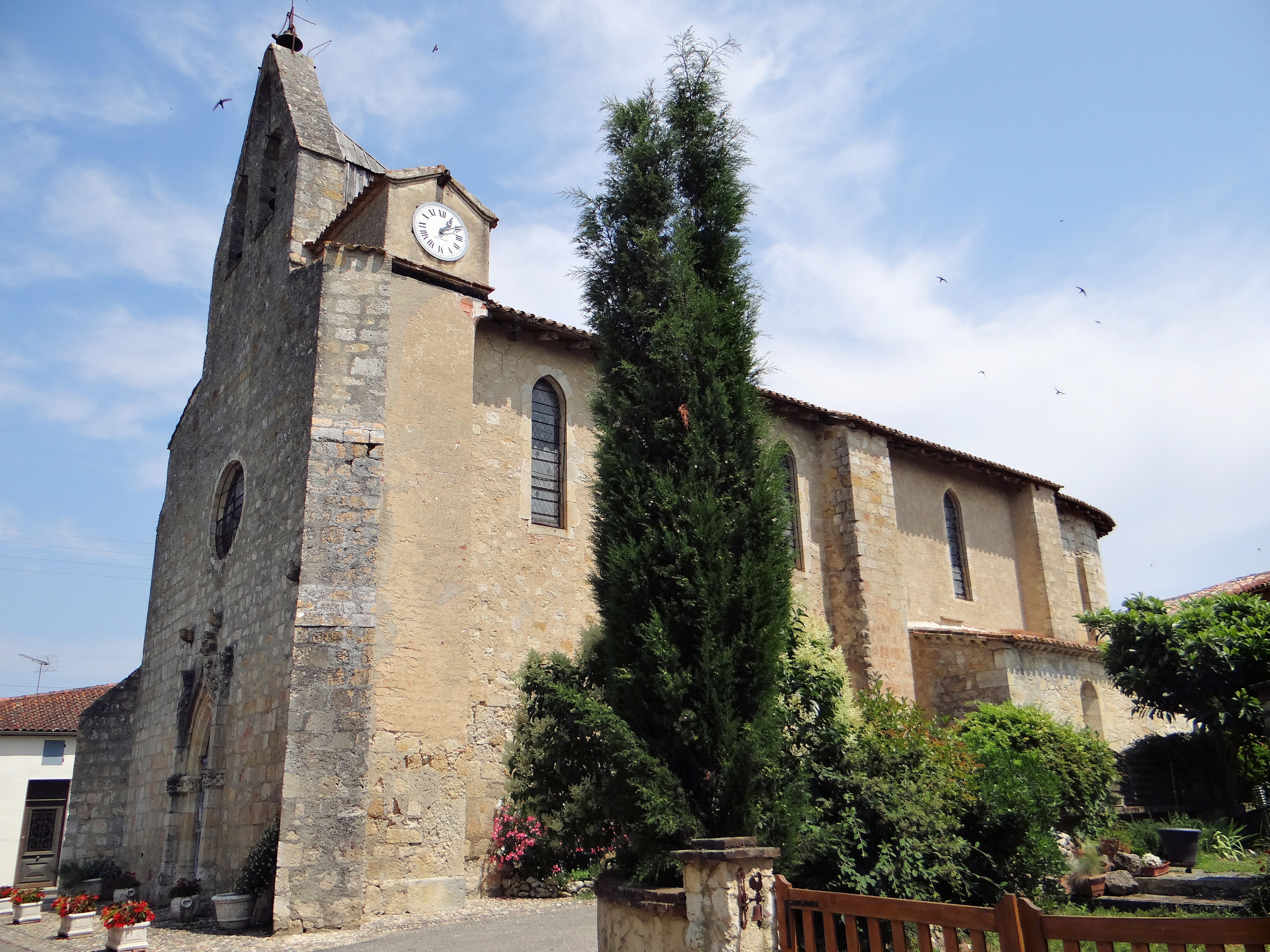 Mansonville - Église Saint-Saturnin - Ensemble